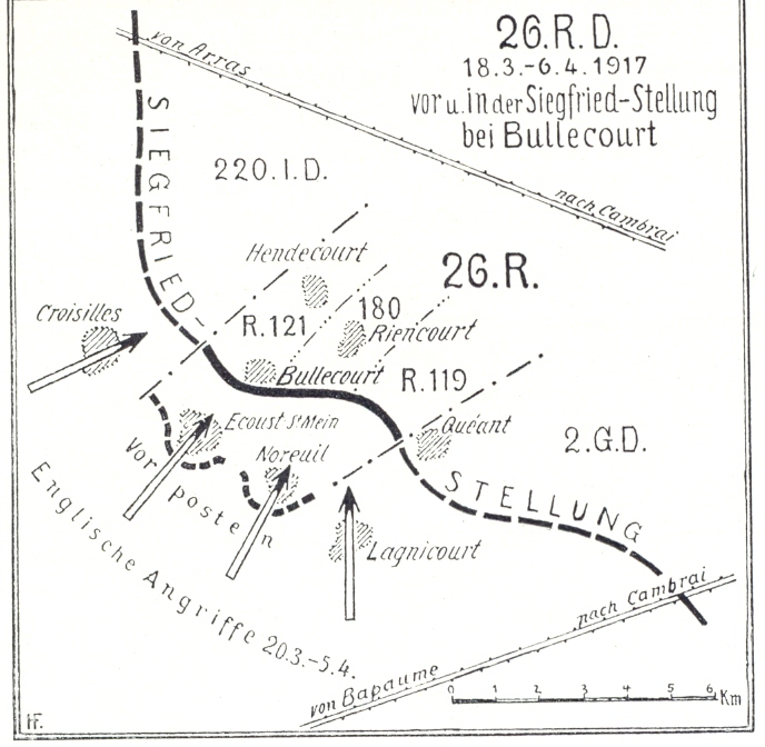 Karte: 26. (Württ.) Reserve-Divison beim Ausbau der Siegfriedstellung vor Bullecourt Im März 1917